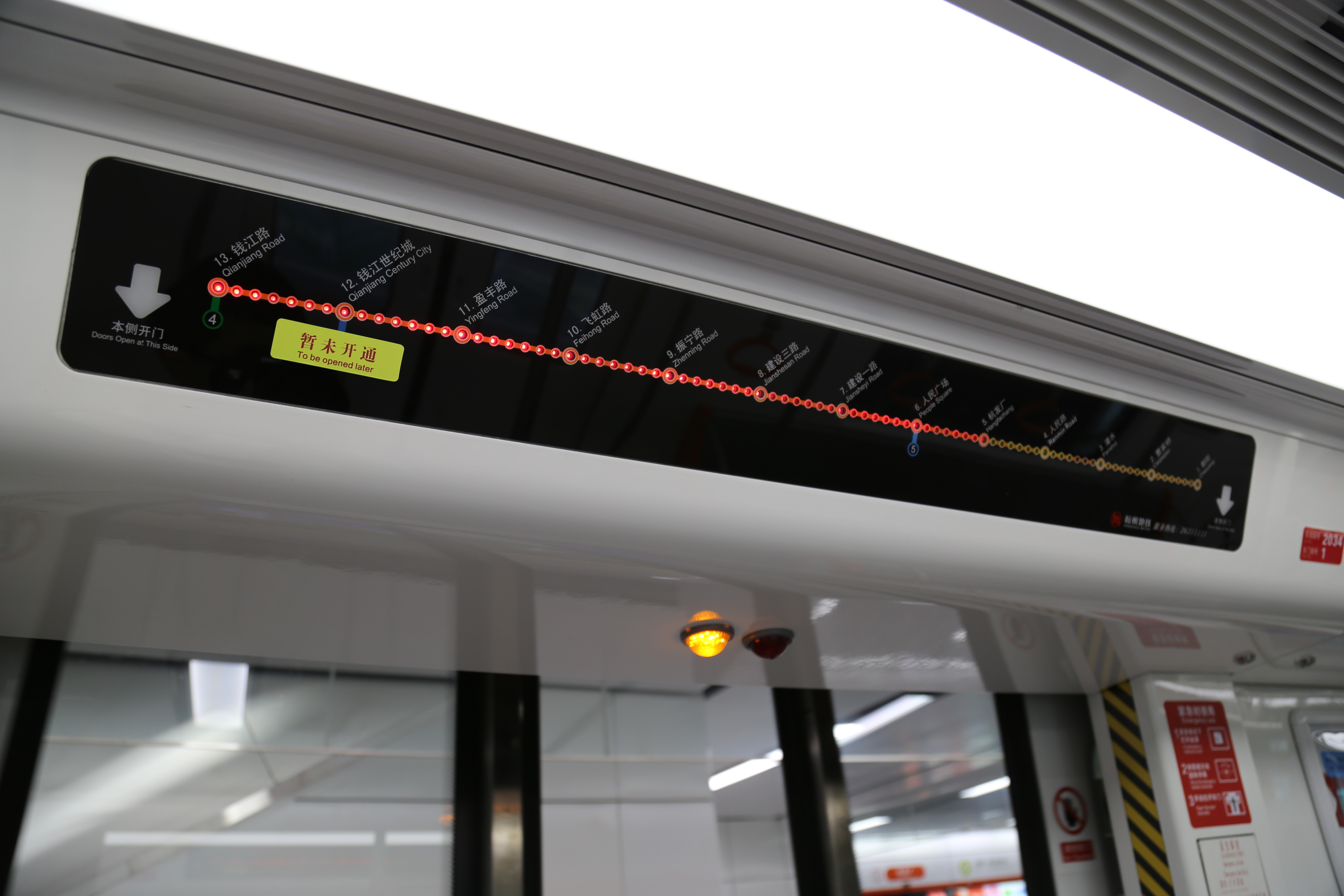 杭州地铁2号线黑色线路图